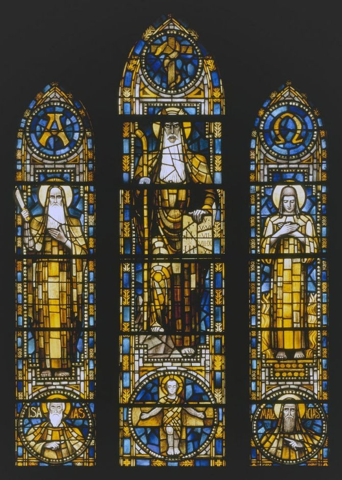 Rooms-katholieke Sint-Vituskerk: Interieur, aanzicht gebrandschilderde glas-in-loodramen (opmerking: Gefotografeerd voor Glas in lood in Nederland 1817-1968)